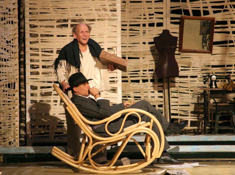 Сцена из спектакля Саратовского театра юного зрителя «Гальера» по пьесе Михаила Бартенева